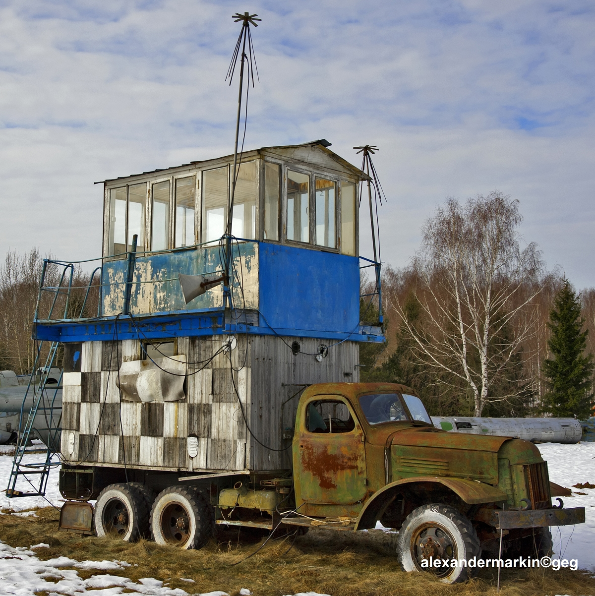 ATC Tower Zis-151